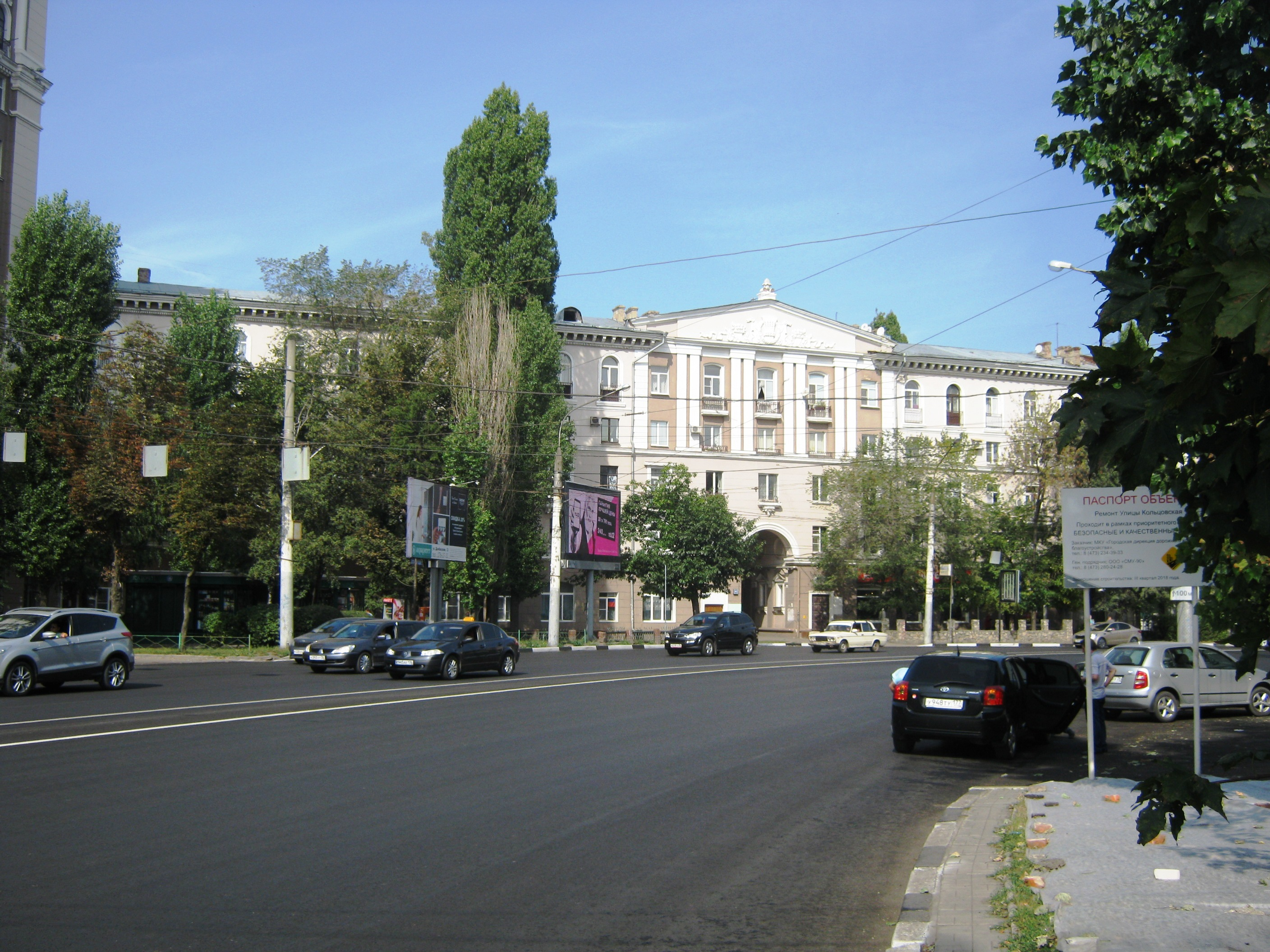 Дом у Девицкого выезда (Воронеж)